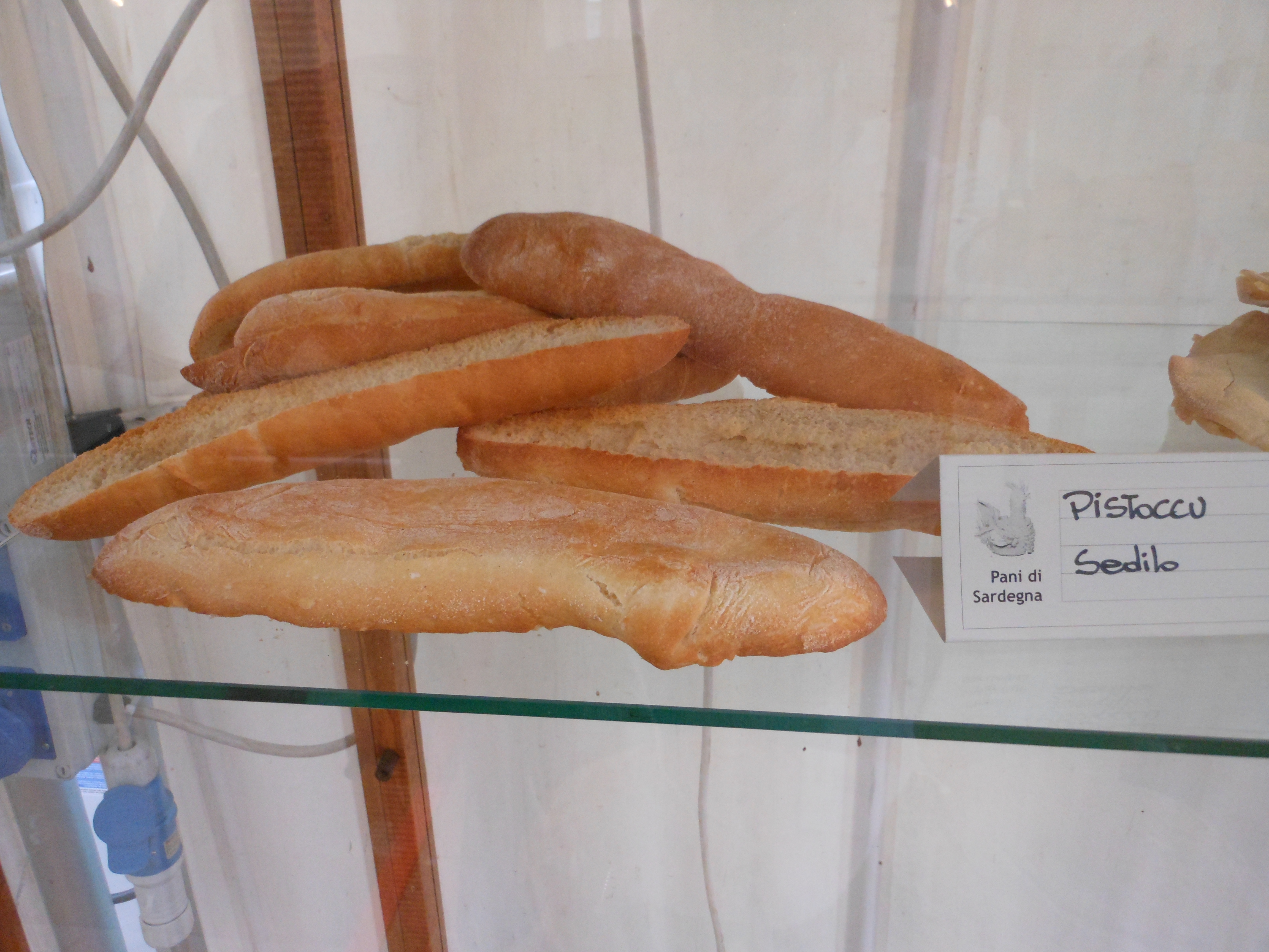 Pane tradizionale